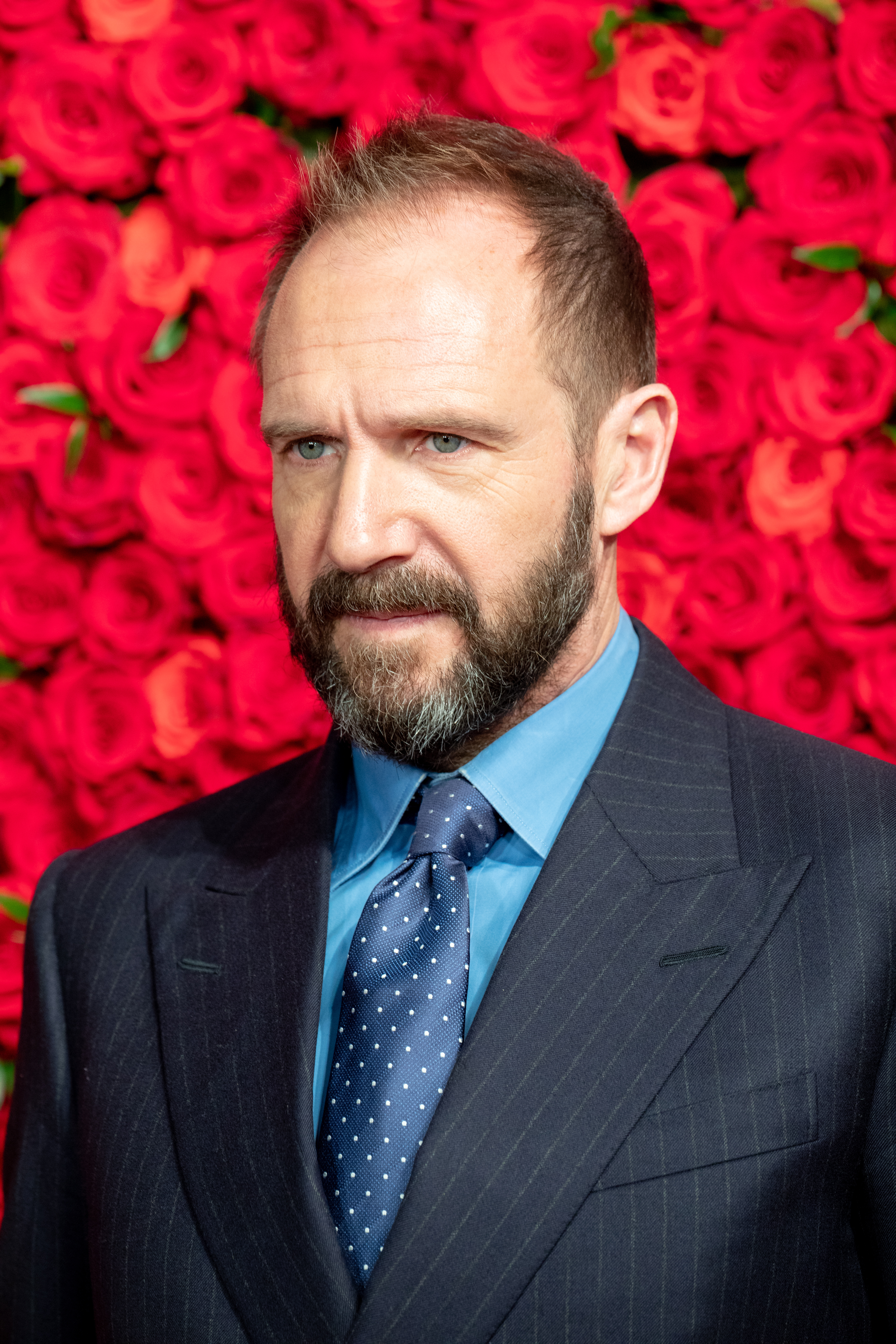 第30回 東京国際映画祭 オープニングセレモニー レイフ・ファインズ (ホワイト・クロウ)